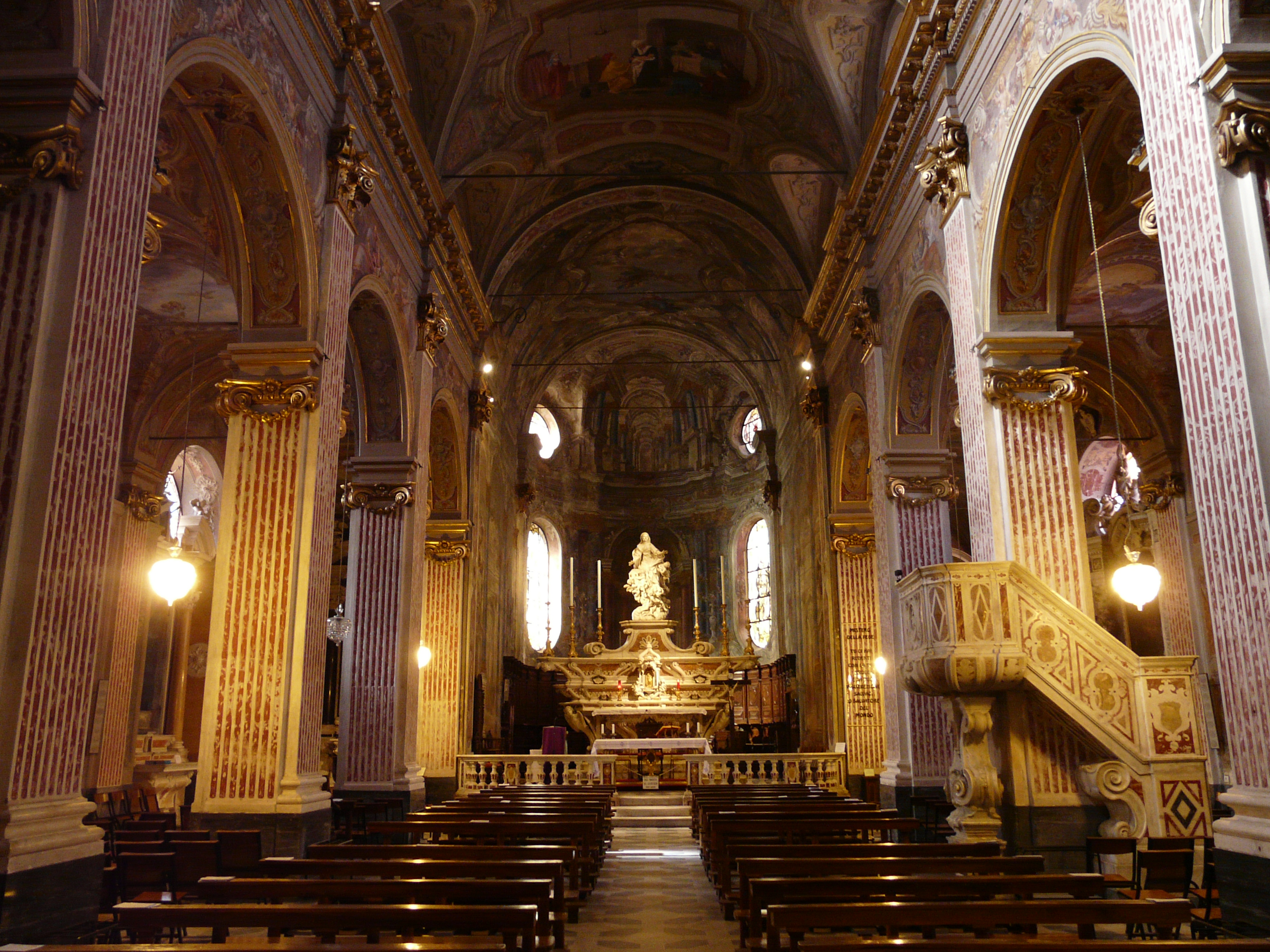 Navata centrale della basilica di Santa Maria di Nazareth, Sestri Levante, Liguria, Italia